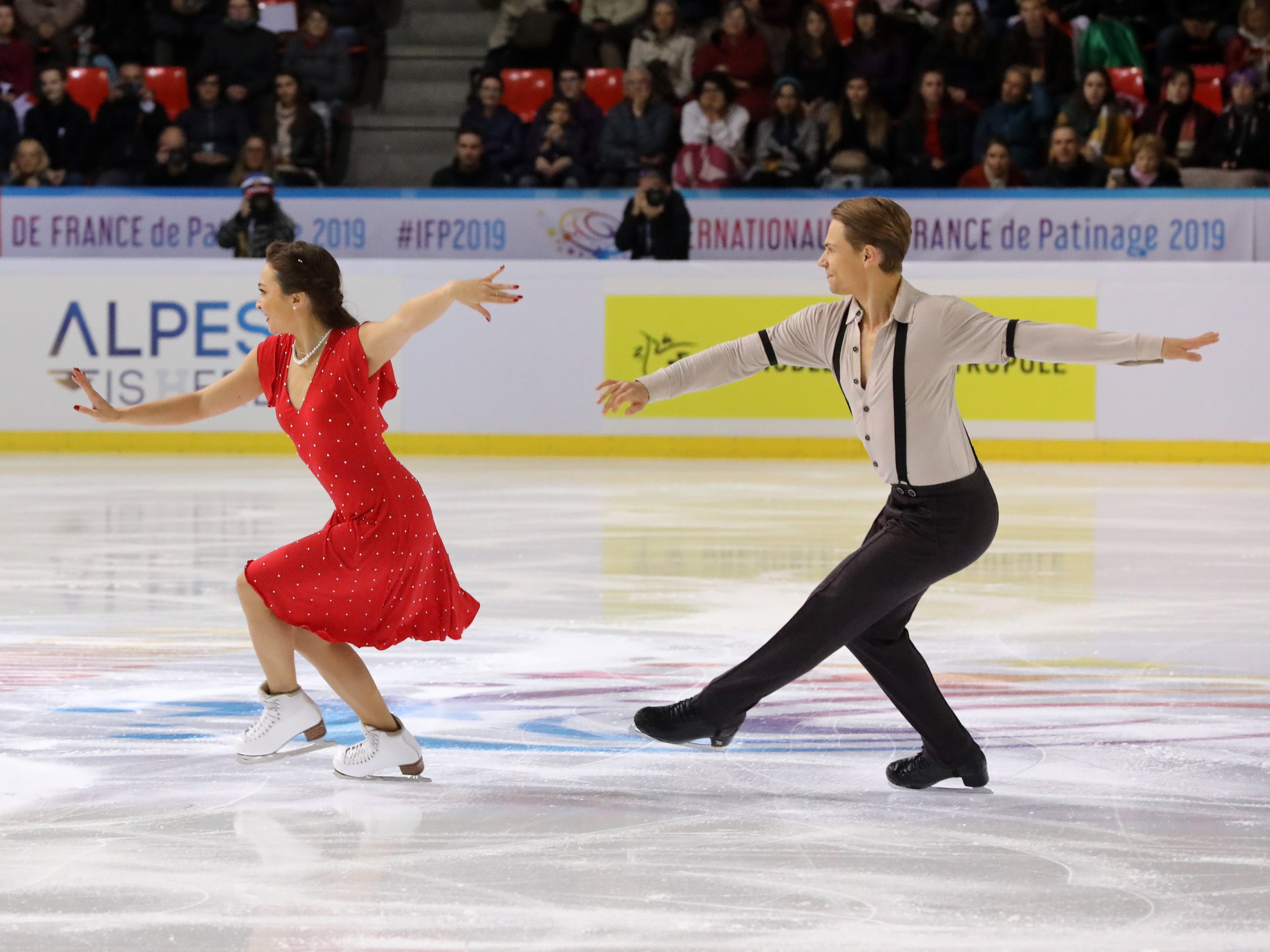 Reed et Ambrulevicius aux Internationaux de France 2019.